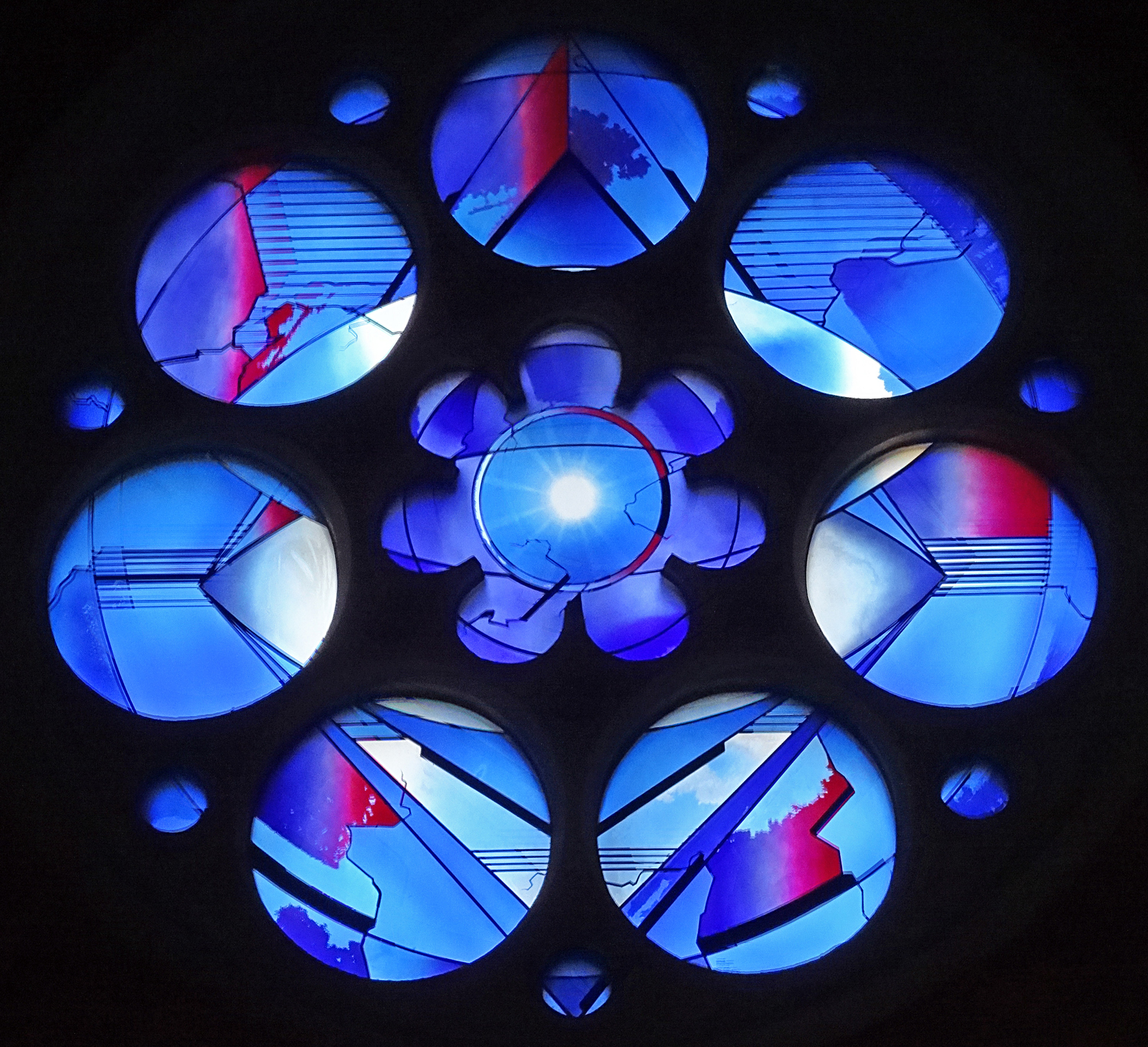 Rosettenfenster von Susanne Precht (Lauscha) über dem Altar in der Thomaskirche zu Erfurt